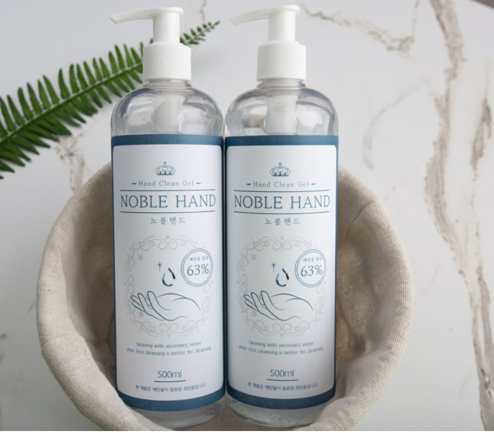 Noble Hand photo, a representative hand sanitizer brand in Korea